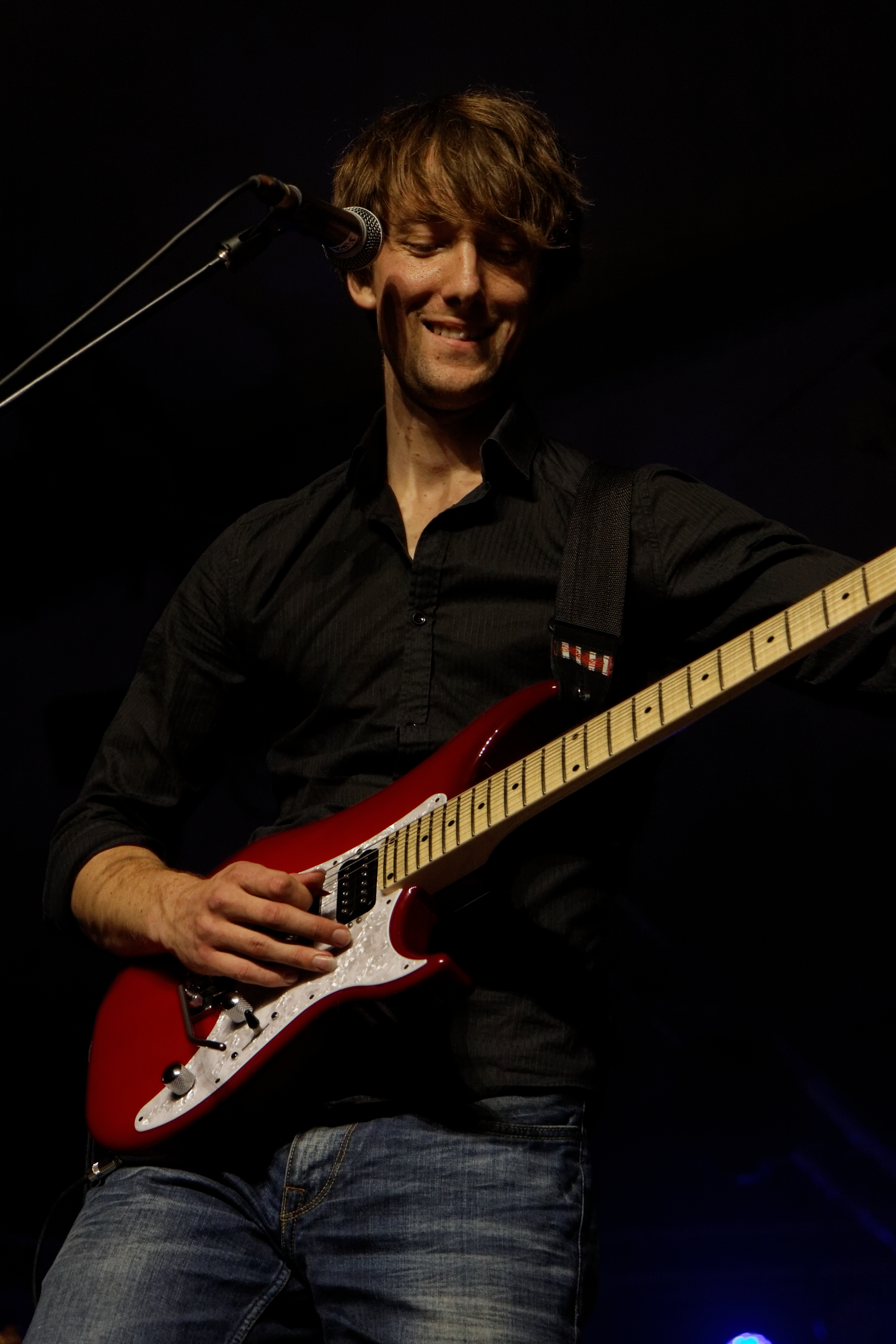 Julien Jaffres en concert à l'espace évêché lors du festival de Cornouaille 2012.